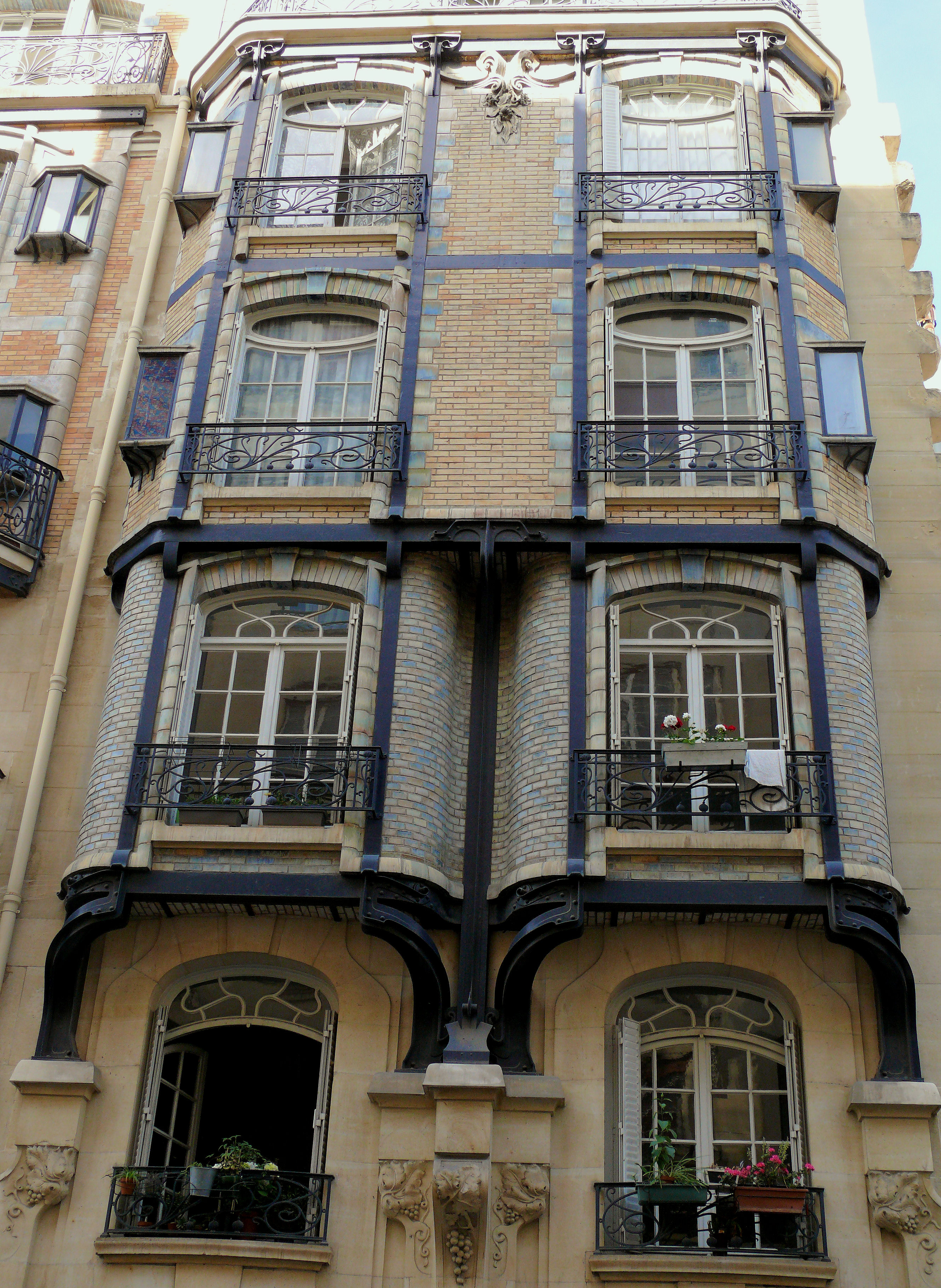 Paris 17ème arrondissement - Immeuble 62-64 rue Boursault